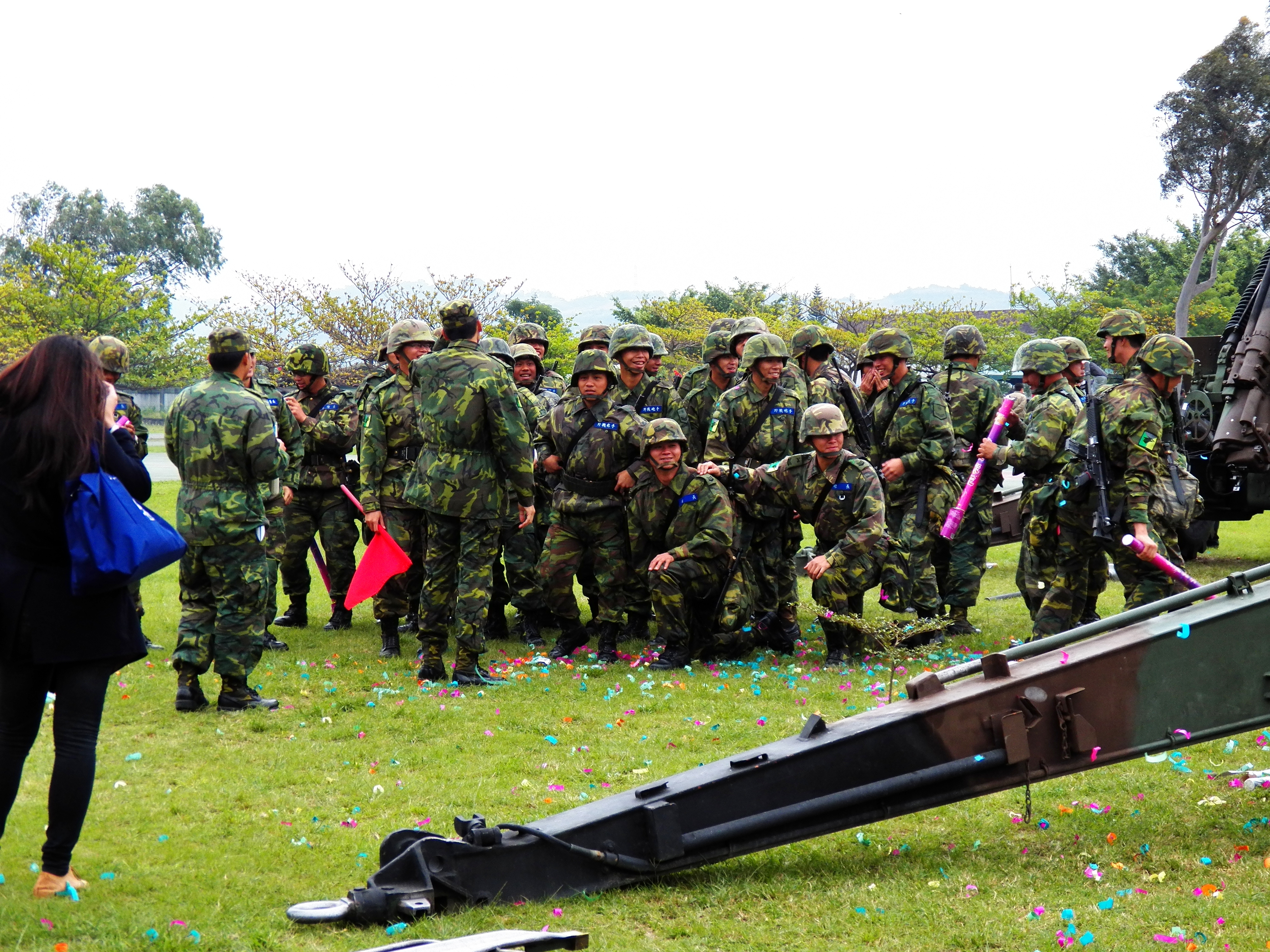 2012年陸軍臺東地區指揮部營區開放活動，節目結束後，慶祝操演圓滿成功的M1A2 155mm榴彈砲砲手。